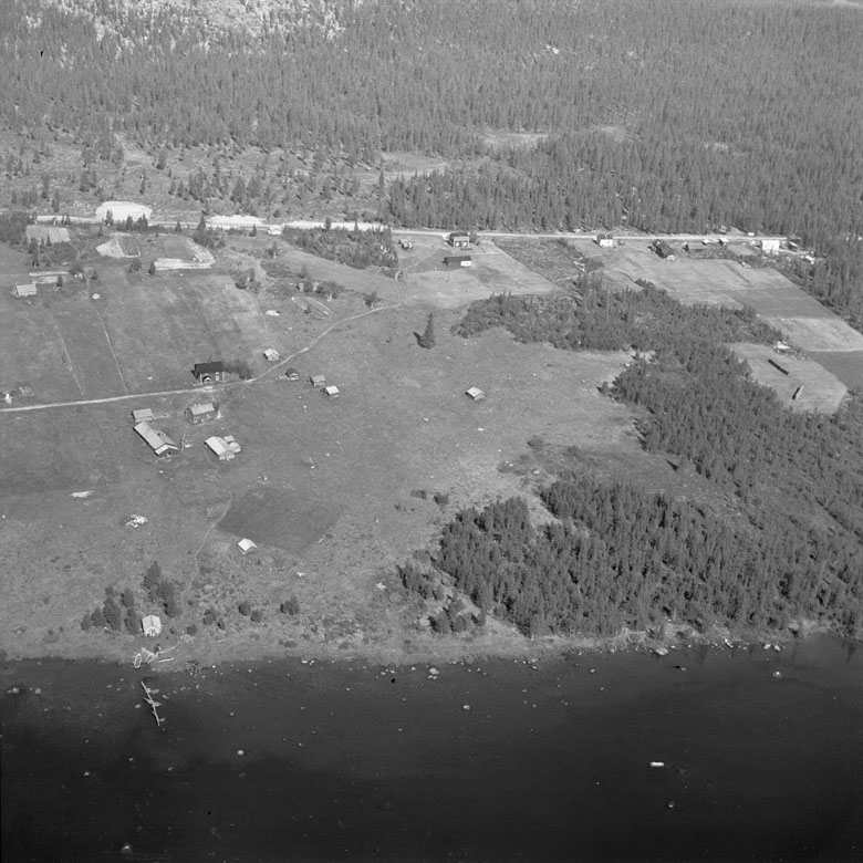 Byn Luovos. Foto mot NNO. Motiv: Karats Nyckelord: Flygbilder Kategori: Bondgård, Flodlandskap Byn Luovos. Foto mot NNO.